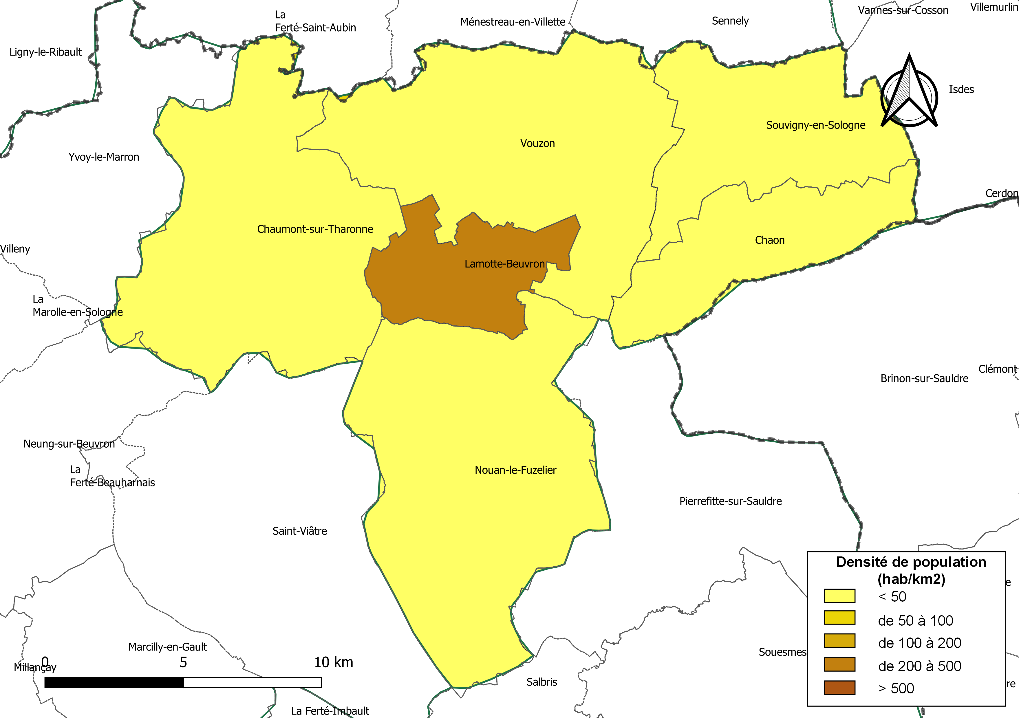 Carte des densités de population (millésimée 2016) des communes de la communauté de communes la Communauté de communes Cœur de Sologne, département de Loir-et-Cher, France. Composition au 1er janvier 2019.